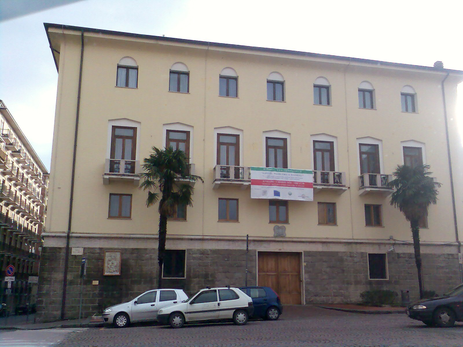 Palazzo del Vescovo Avellino